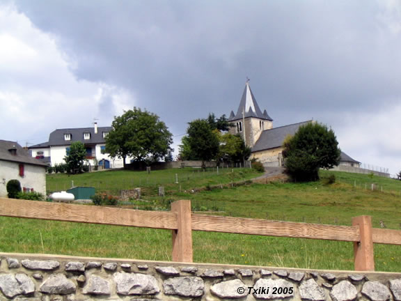 Vue du village d'Altzai Pyrénées).